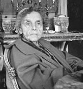 Anna och Marja Casparsson i Villa Snäckan i Saltsjöbaden